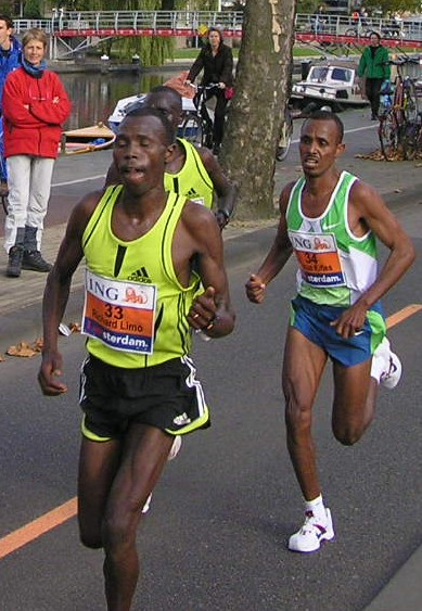 Richard Limo tijdens de marathon van Amsterdam in 2007, waar hij als tweede finishte. Achter hem Yonas Kifle uit Eritrea en (vrijwel onzichtbaar) de winnaar, Emmanuel Mutai.